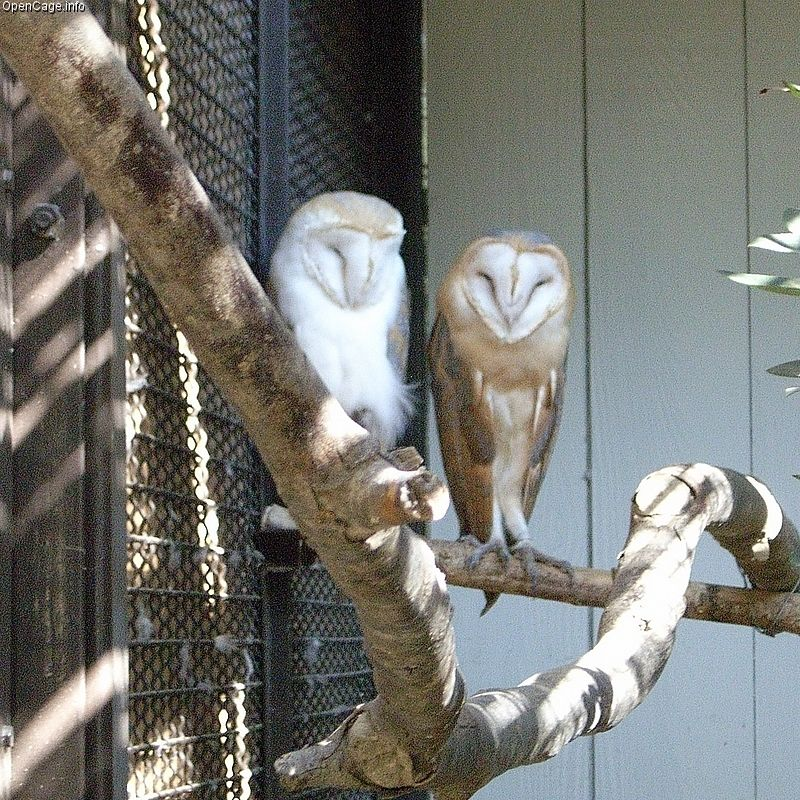 メンフクロウ（Barn Owl Tyto alba）